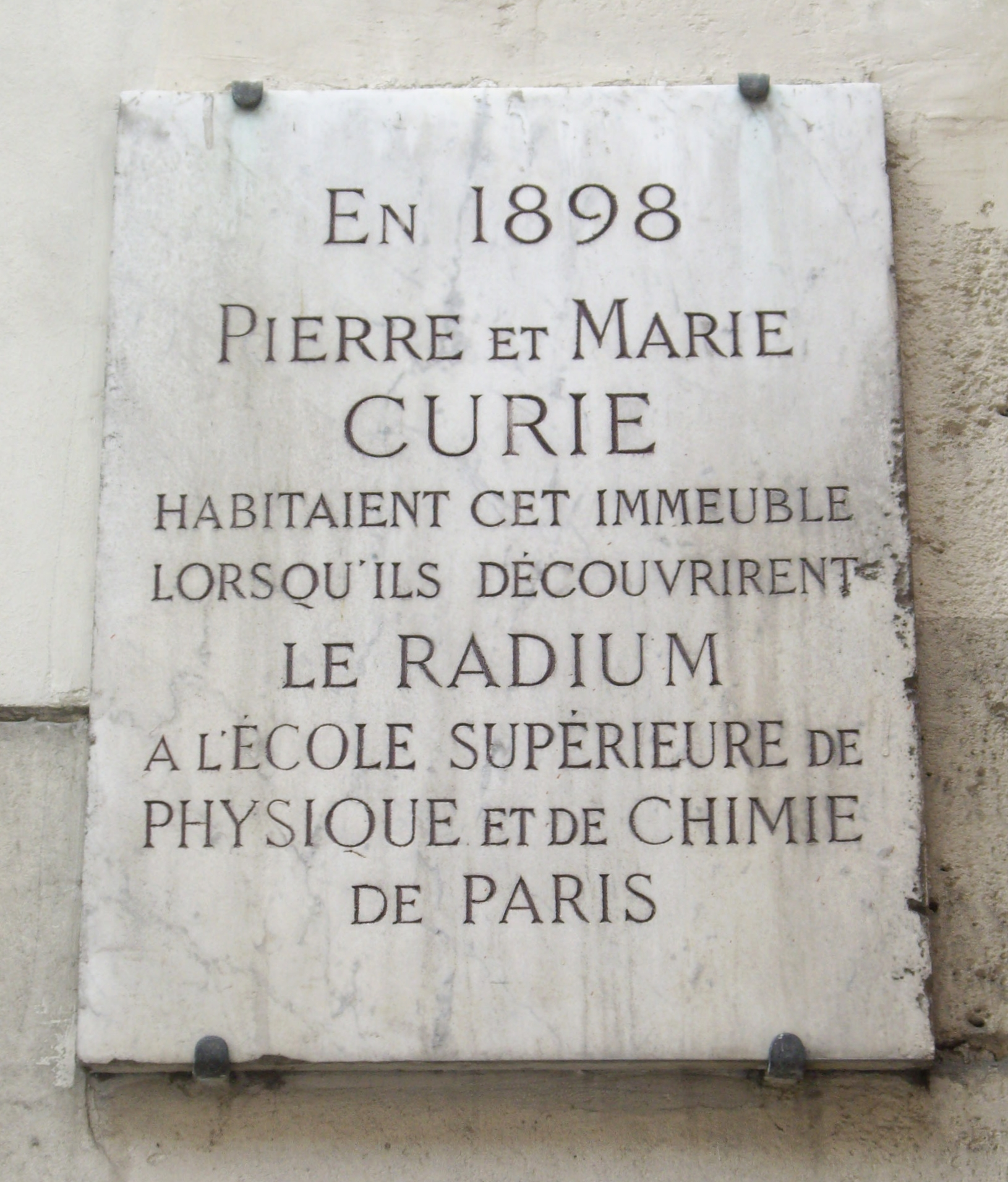 Plaque commémorative, 24 rue de la Glacière, Paris 13e. « En 1898, Pierre et Marie Curie habitaient cet immeuble lorsqu'ils découvrirent le radium à l'École supérieure de physique et de chimie de Paris. »